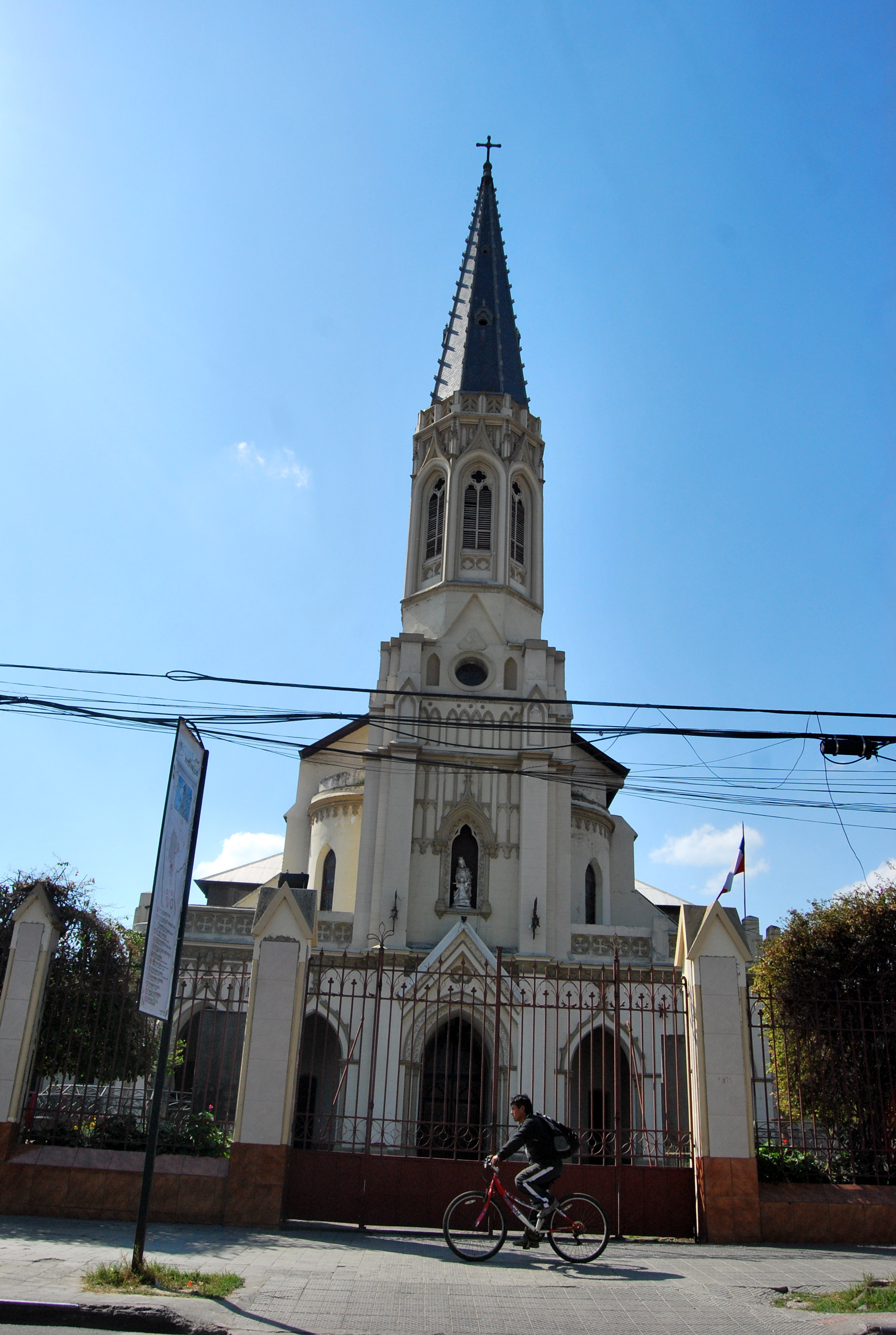 Iglesia Parroquial Santa Filomena This is a photo of a national monument in Chile: 135